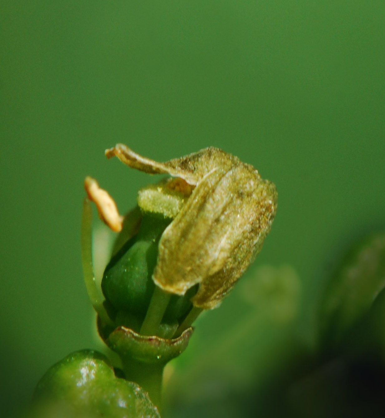 From the author: "Les 5 pétales sont soudés entre eux par leur sommet. Ils se détachent par le bas en formant une coiffe. Ugni blanc, Cognac."